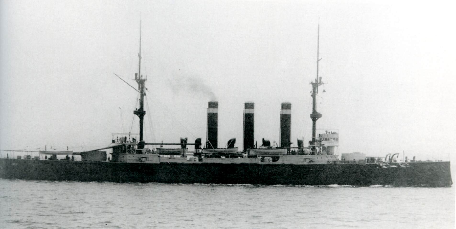 IJN Izumo at Kobe